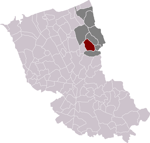 Locatie gemeente Rekspoede in arrondissement Duinkerke. Zelfgemaakt. Location of Rexpoëde municipality in the arrondissement of Dunkirk. Self made. Localisation de la commune de Rexpoëde dans l'arrondissement de Dunkerque. Fait moi-même.